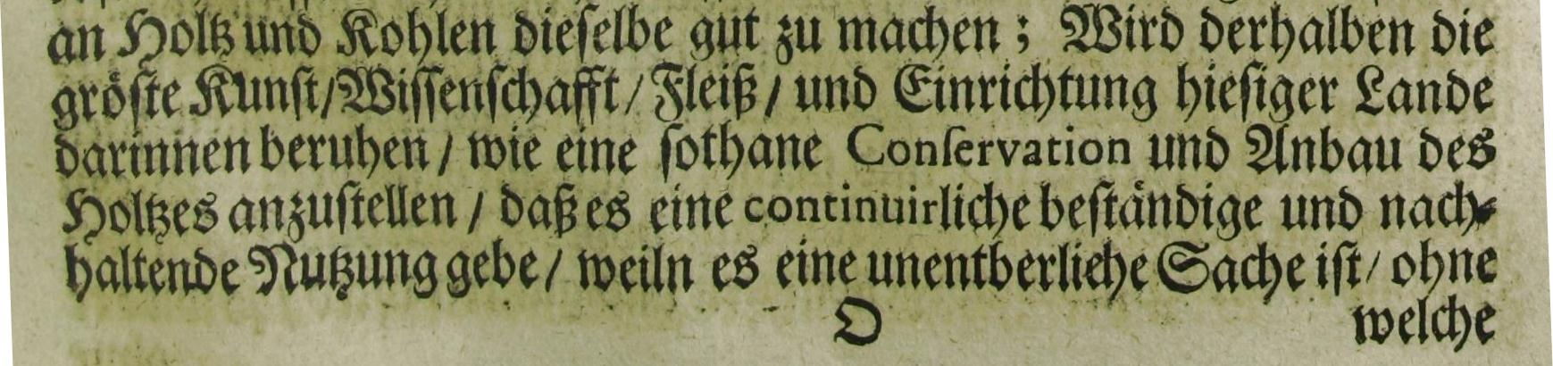 erstmalige Verwendung des Begriffs "nachhaltende Nutzung" in Hans Carl von Carlowitz "Sylvicultura Oeconomica, Oder Haußwirthliche Nachricht und Naturmäßige Anweisung Zur Wilden Baum-Zucht"